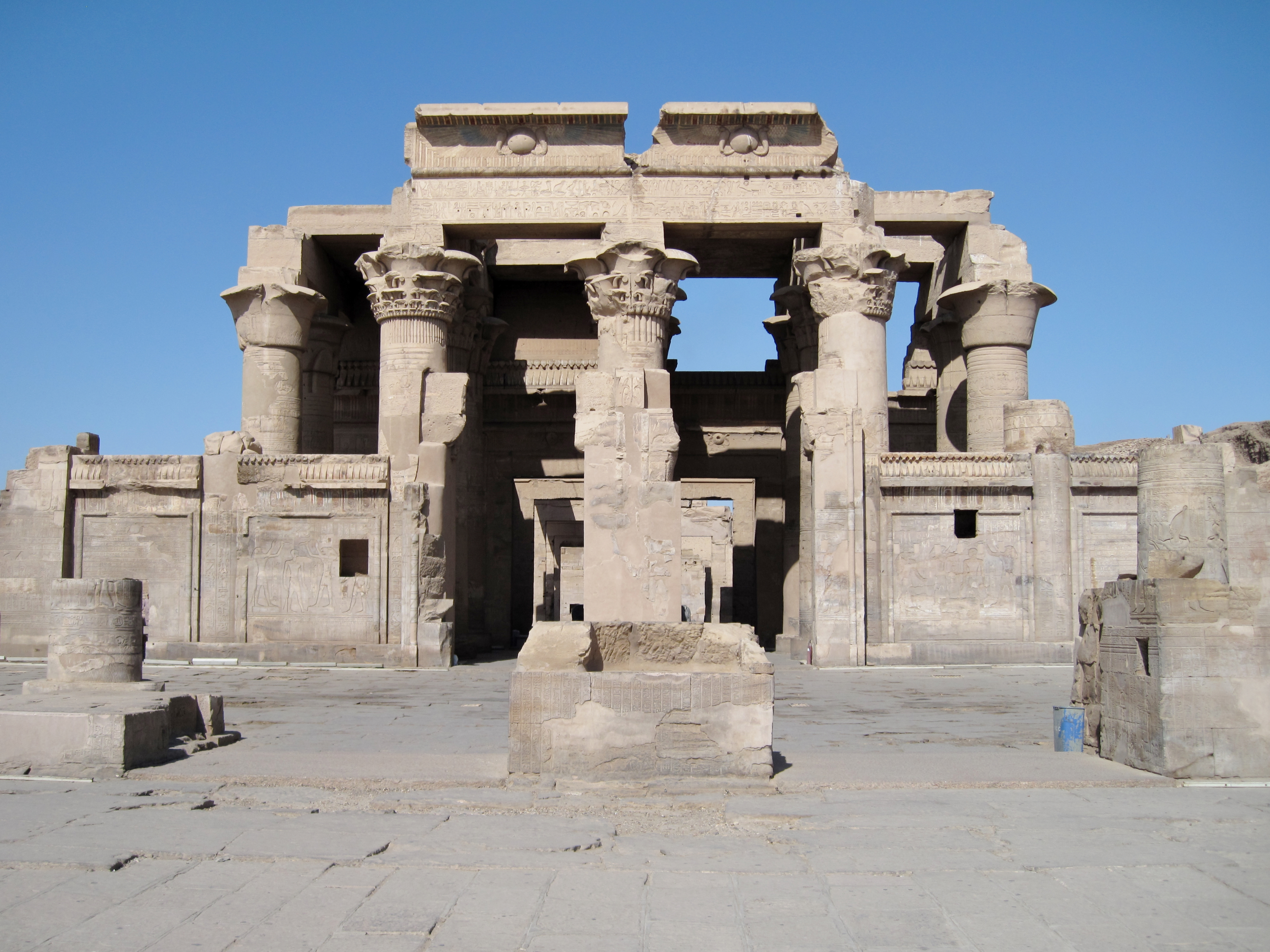 Doppelportal des Tempels von Kom Ombo, Ägypten